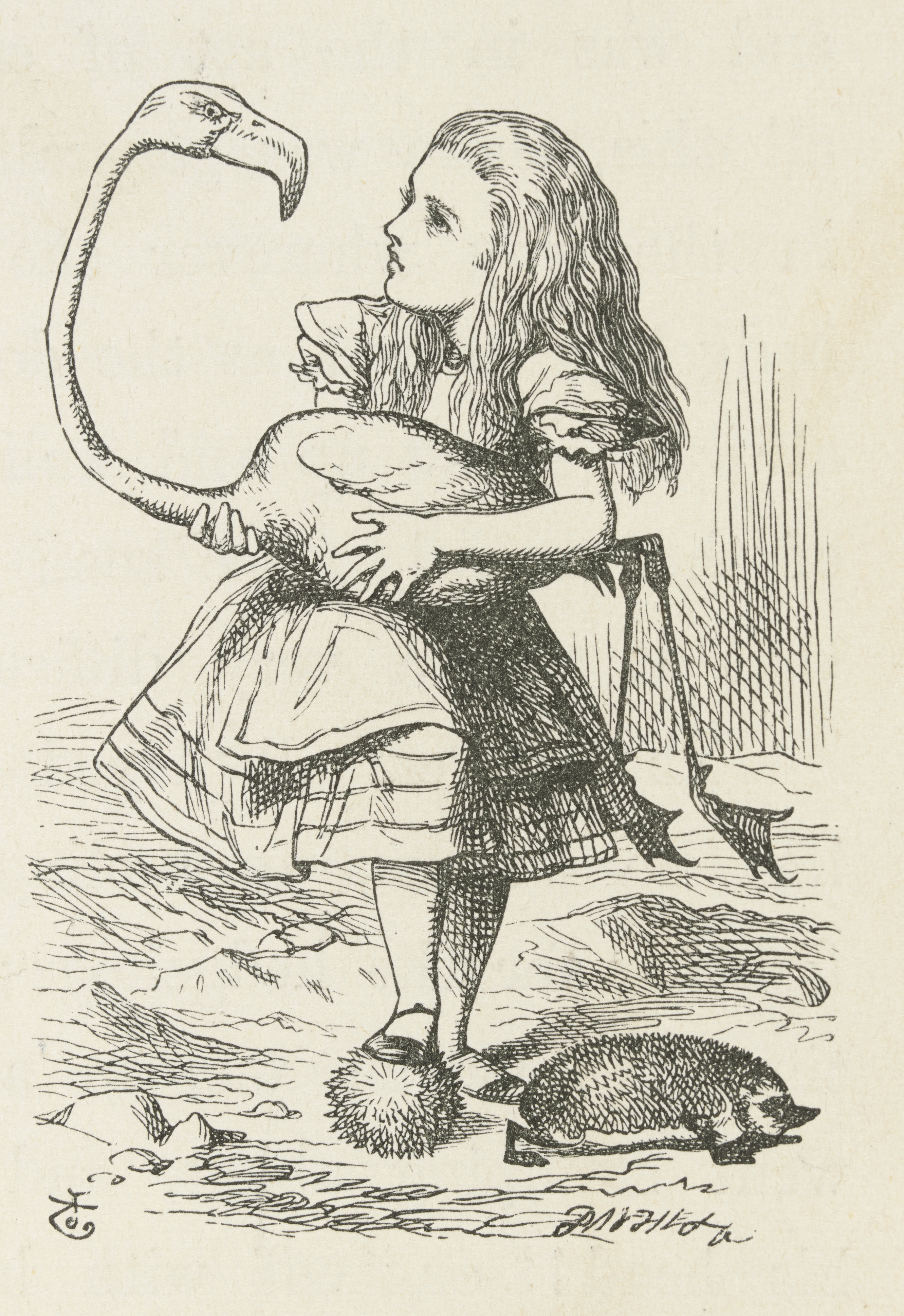 Alice’s Abenteuer im Wunderland Übersetzer: Antonie Zimmermann Orginal Titel: Alice's Adventures in Wonderland Illustrationen: John Tenniel